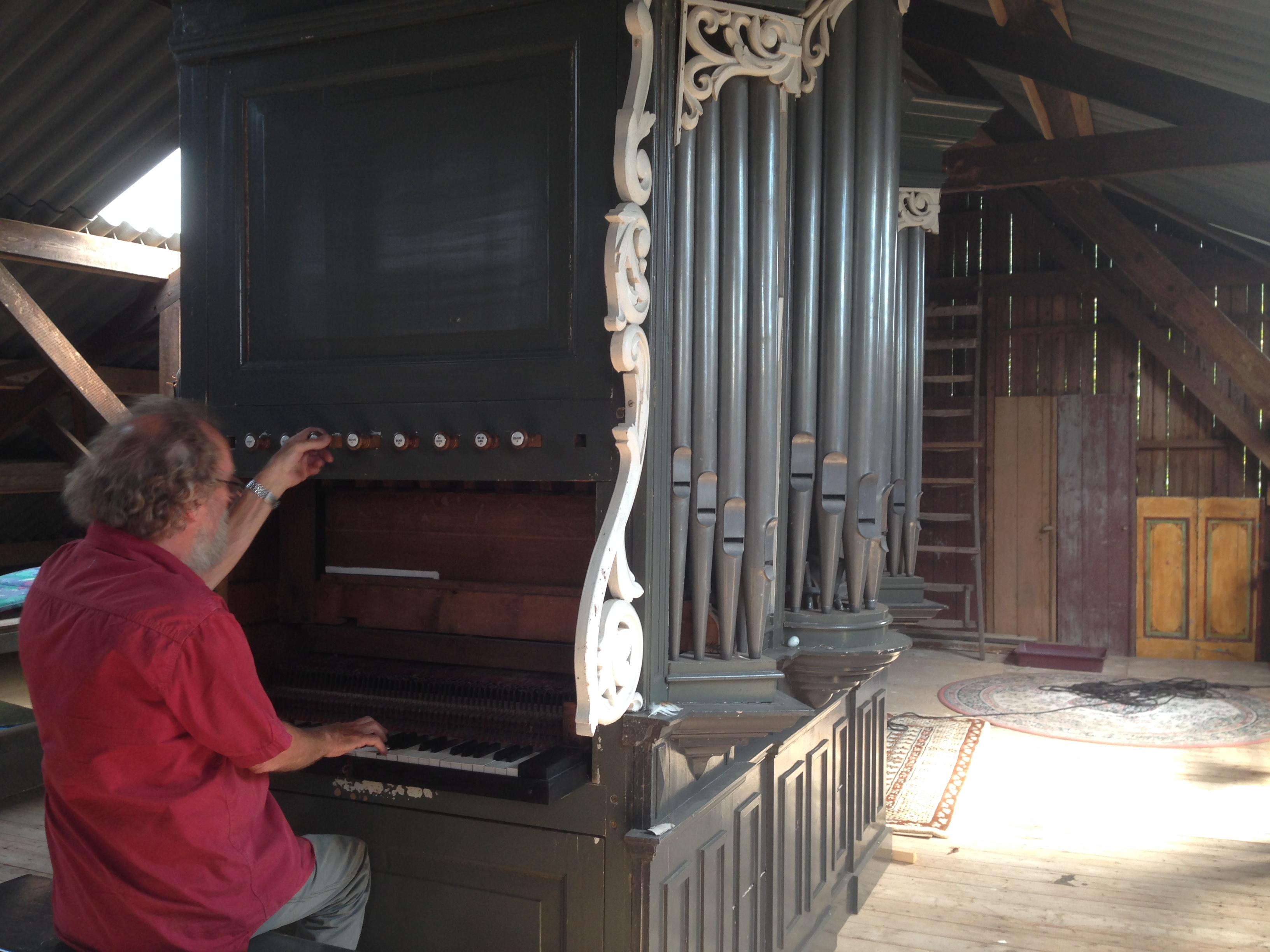 Harmonium Museum in Paasloo, Overijssel, Netherlands